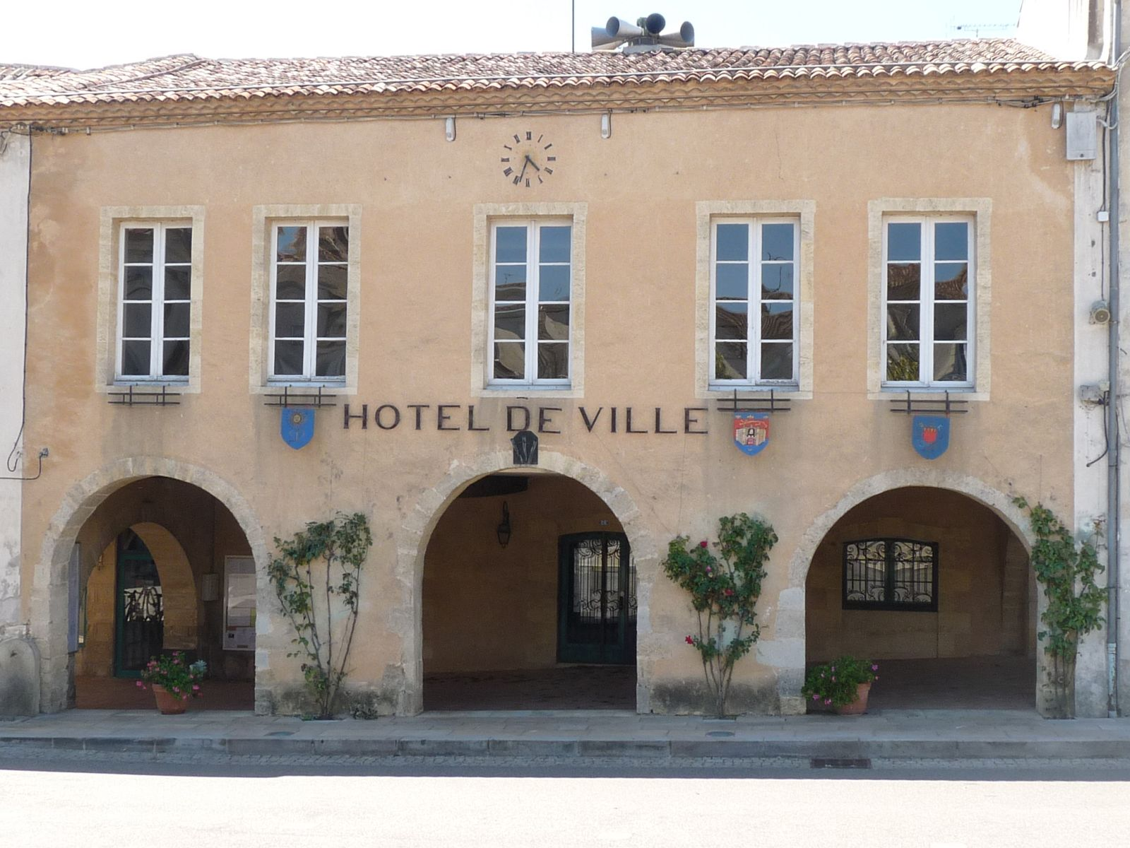 mairie de Sauveterre-de-Guyenne, Gironde, France